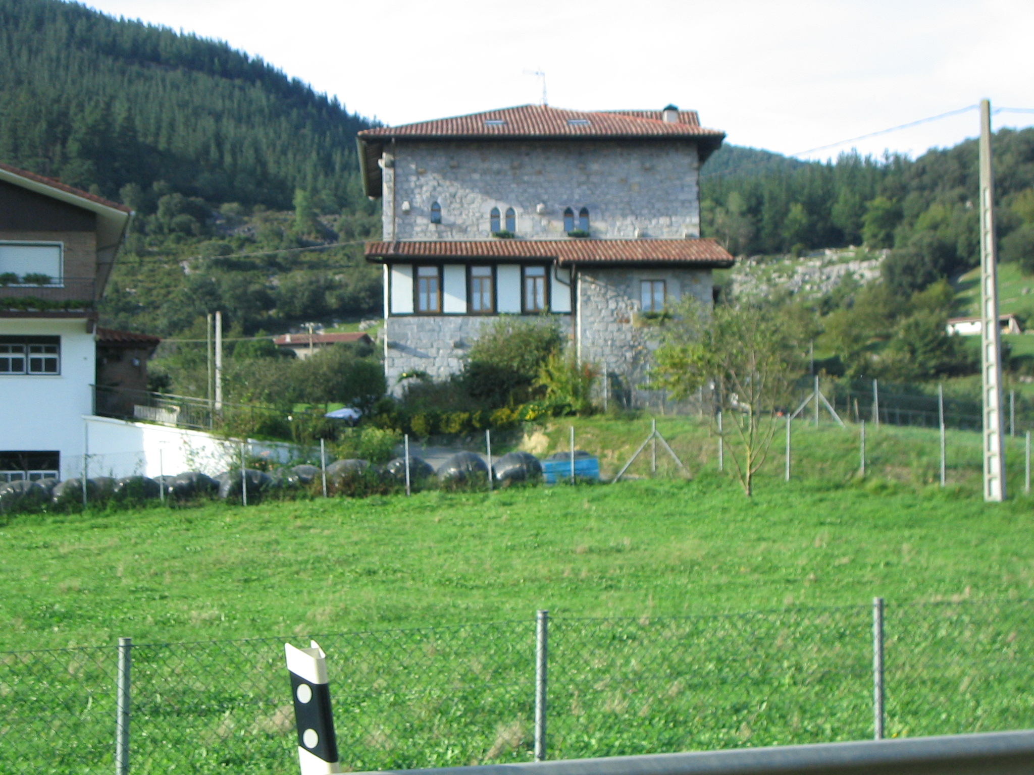 Torre de Asotegi en Markina, Vizcaya, País Vasco, España.